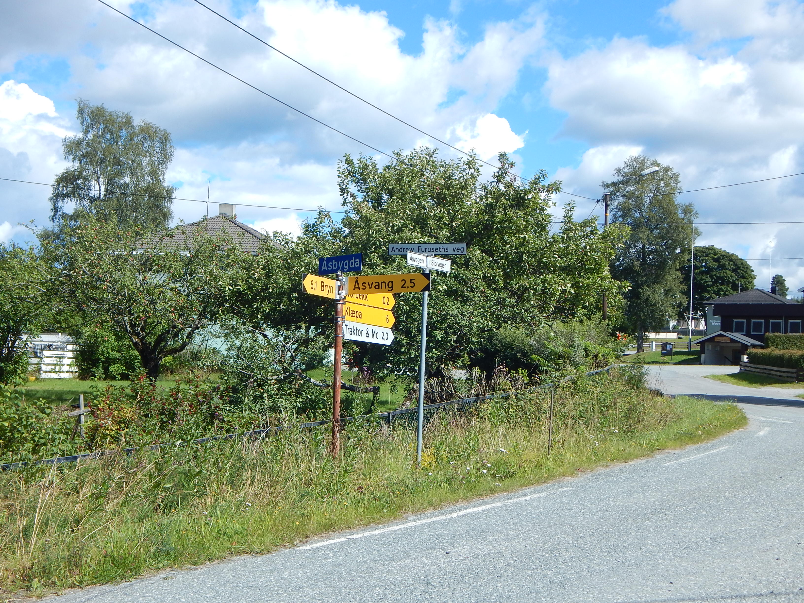 Åsbygda (Hekne) sentrum, i krysset mellom Andrew Furuseths veg (FV1886), Storvegen (FV1886) og Åsvegen (FV1916)